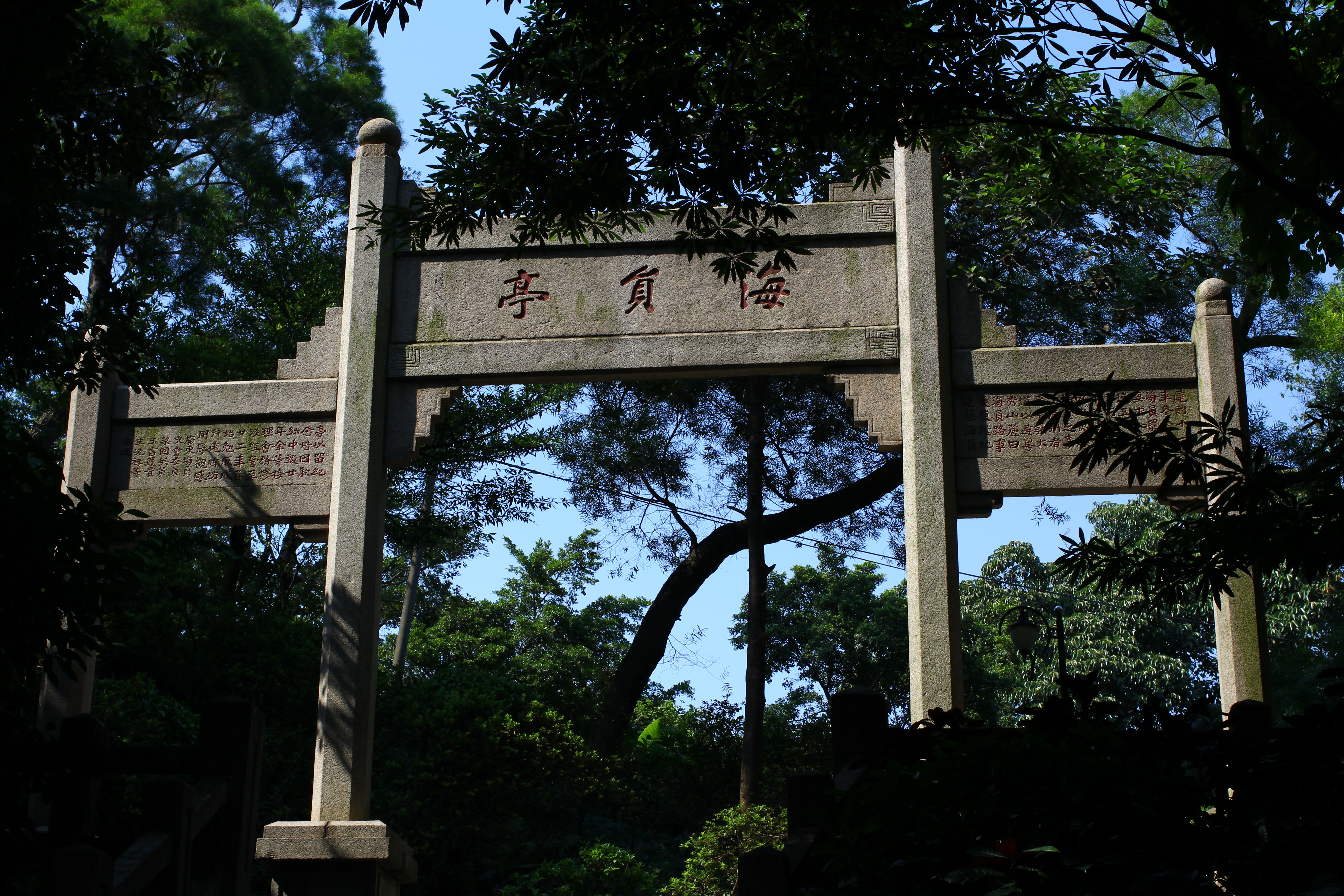 海員亭牌坊